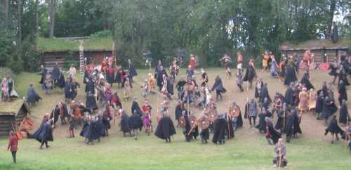 Stiklestadspelet 2003. Fotograf Einar Faanes